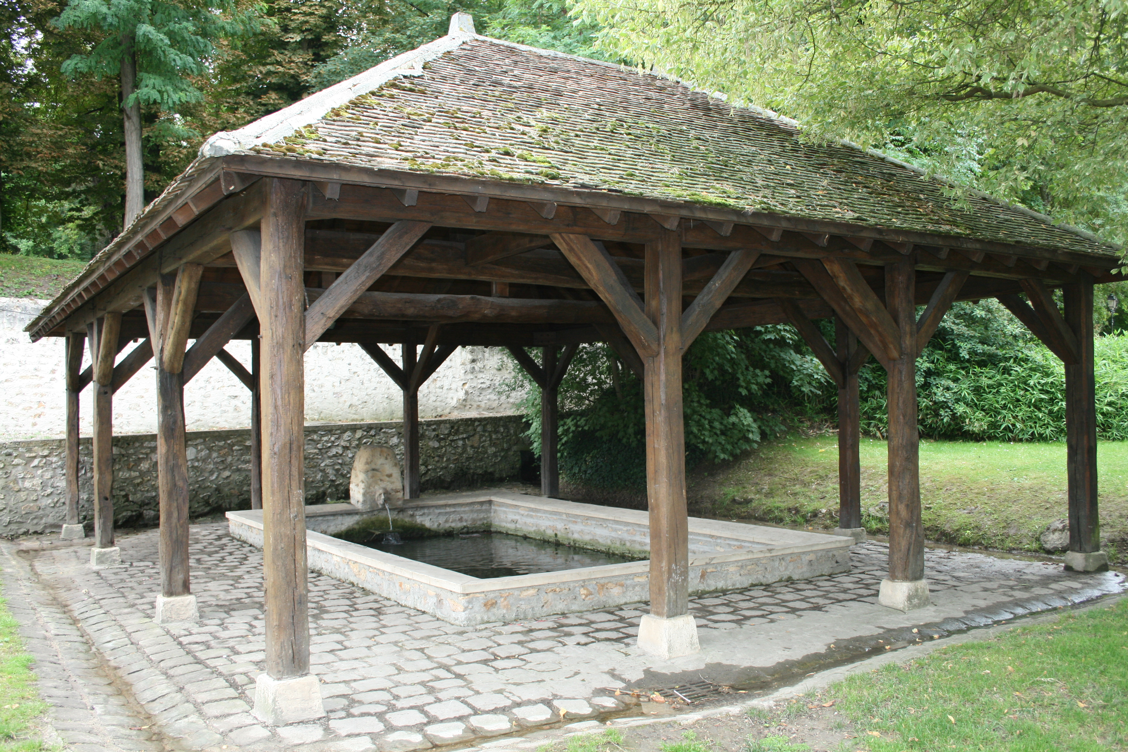 Le lavoir, près du cimetière, où se trouve la tombe de Louis BRAILLE (Coupvray, Seine-et-Marne, région Île-de-France).